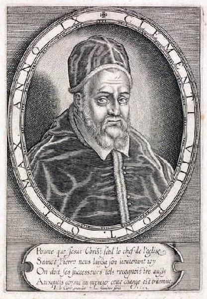 Clément VIII